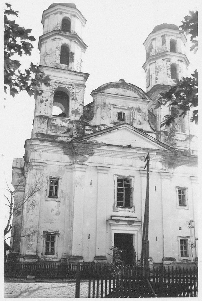 Беларуская (тарашкевіца): Ушачы (Ušačy), пляц Рынак (plac Rynak). Касьцёл дамініканаў